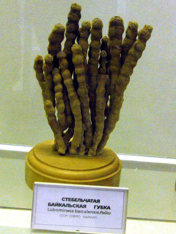 Любомирския байкальская (Lubomirskia baicalensis)